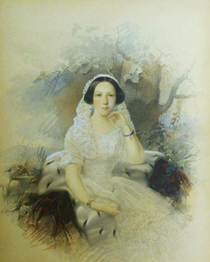 Княгиня Прасковья Борисовна Щербатова, ур. Святополк-Четвертинская (1818—1899)